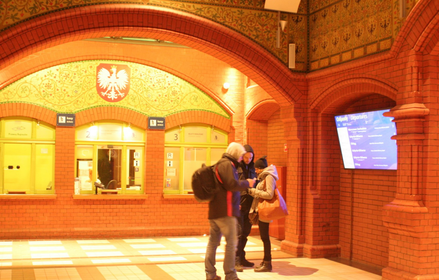 Wnętrze zabytkowego dworca w Malborku